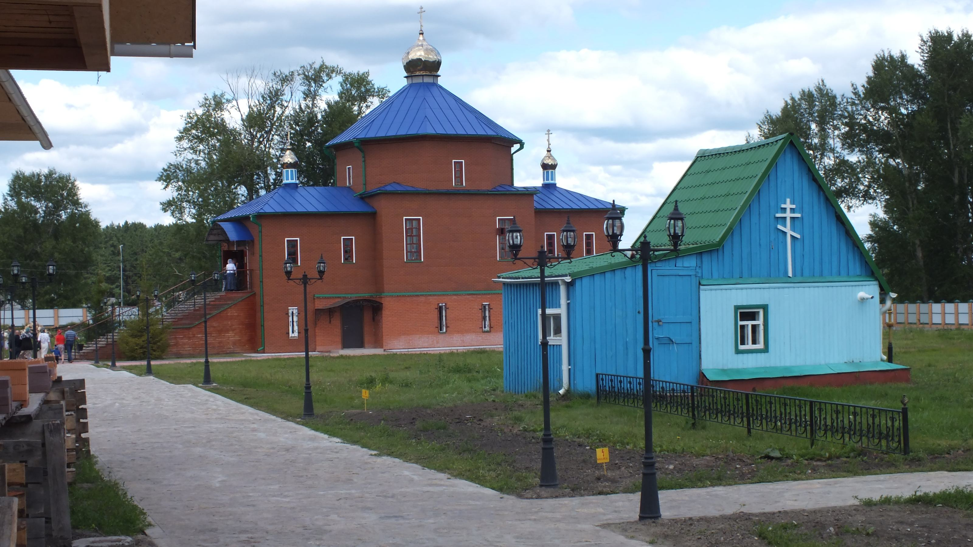 Belozersky District, Kurgan Oblast, Russia